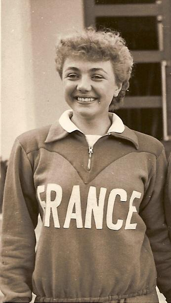 Evelyne Golhen Internationale Française de Basketball